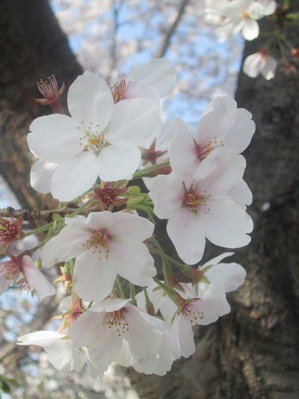 桜の花 （おそらくソメイヨシノ） 京都市、2004年4月上旬